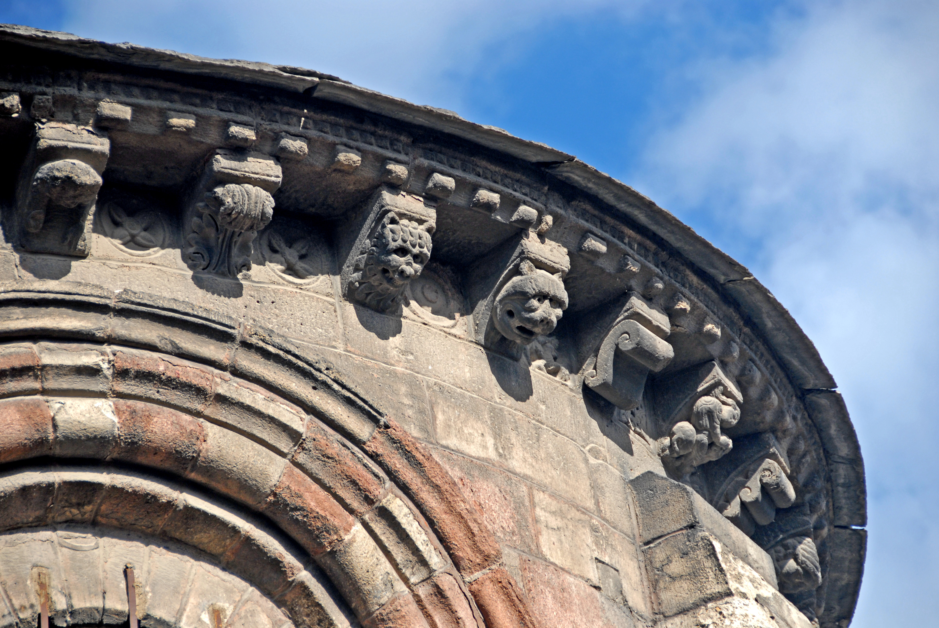 St.-Julien Brioude, Traufgesims Scheitelkapelle